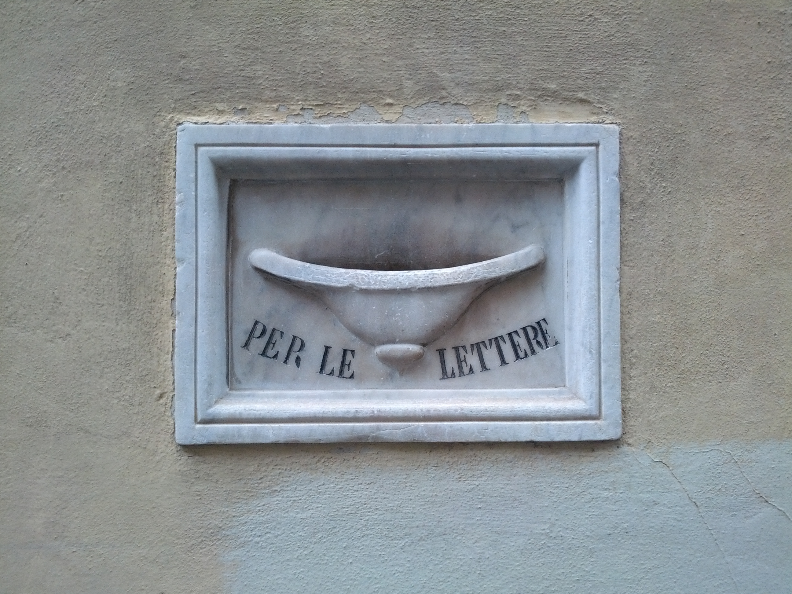 post box, cassetta per lettere, Via Orsanmichele n. 4, Firenze